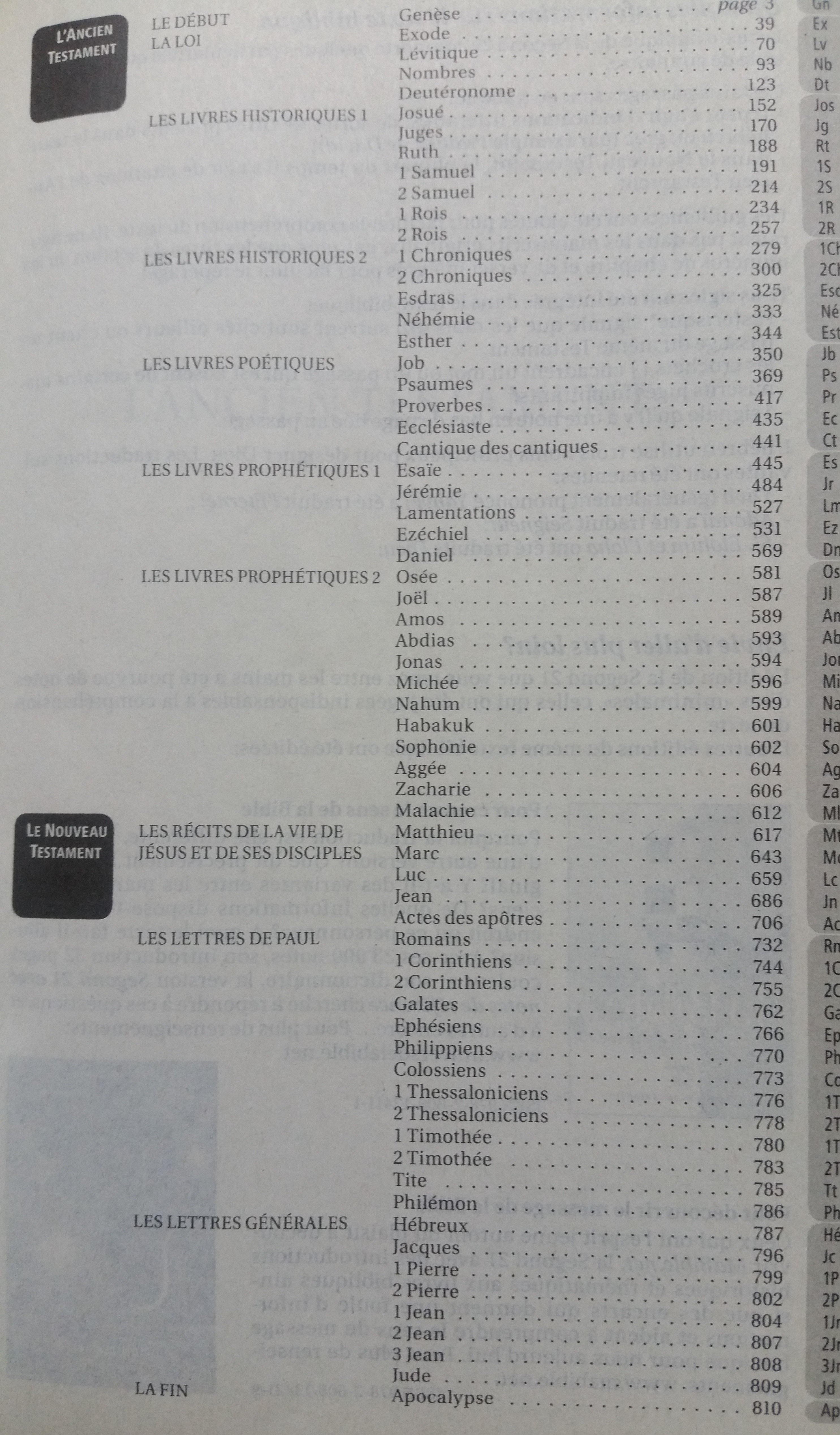 Présentation des textes bibliques par l'éditeur Société Biblique de Genève en 2007